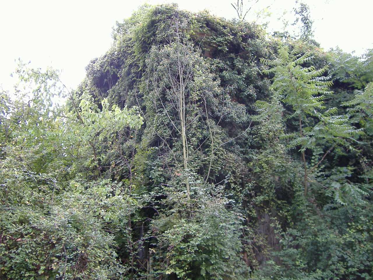 Ex stazione di Valeriano invasa dal verde